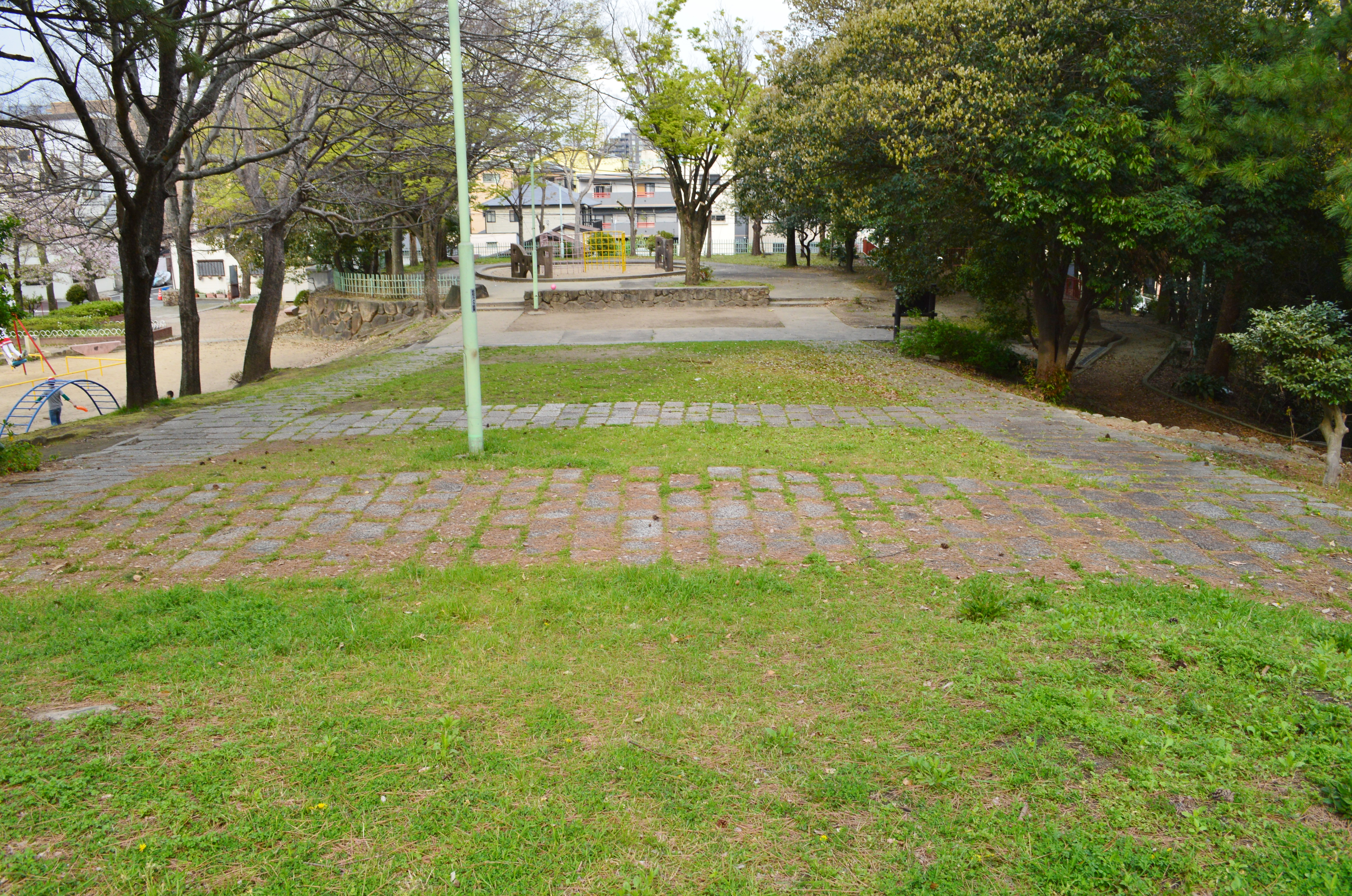 西求女塚古墳 後方部から前方部を望む